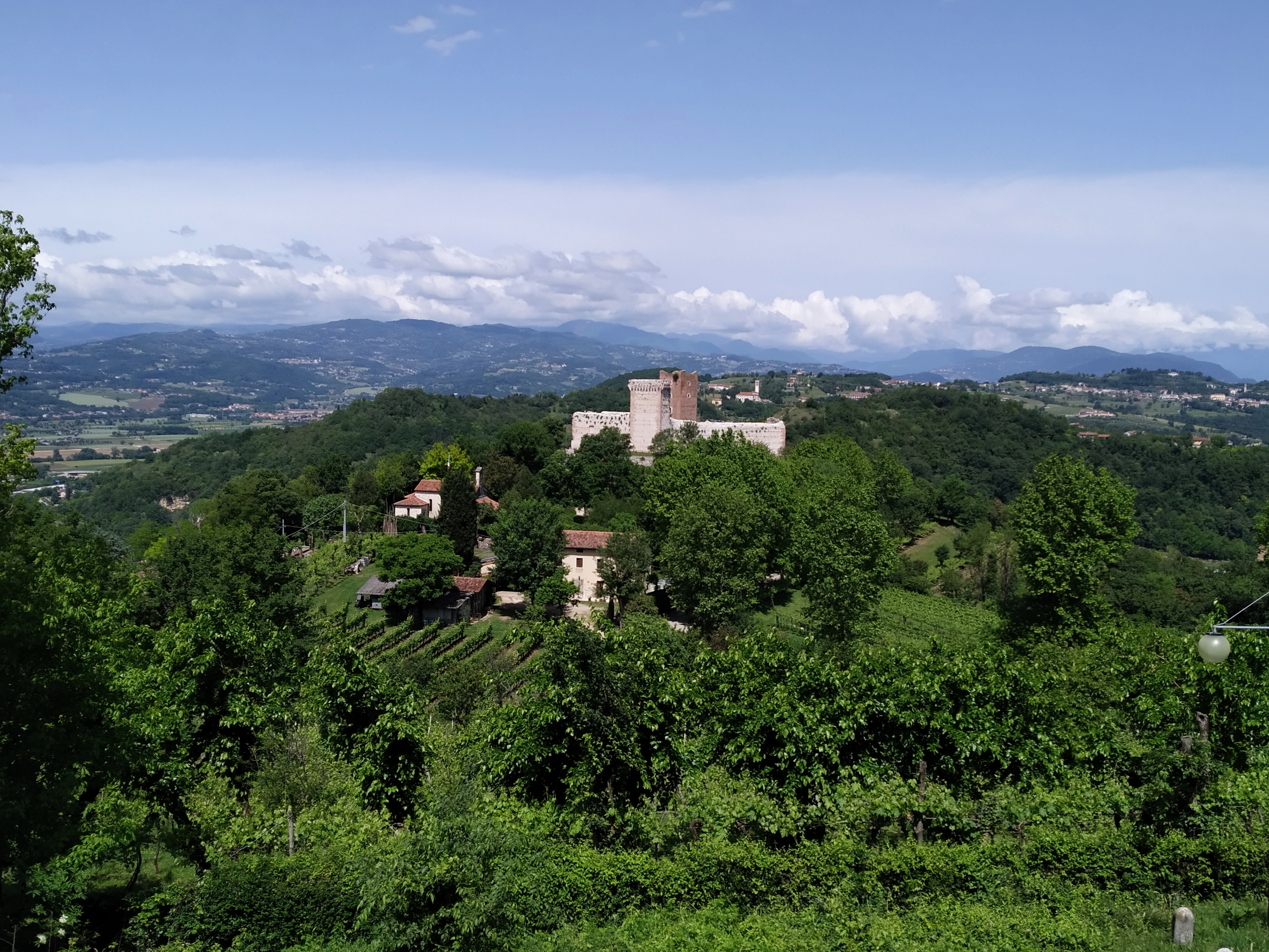 Panorama del Castello della Villa ritratto dal Castello di Bellaguardia